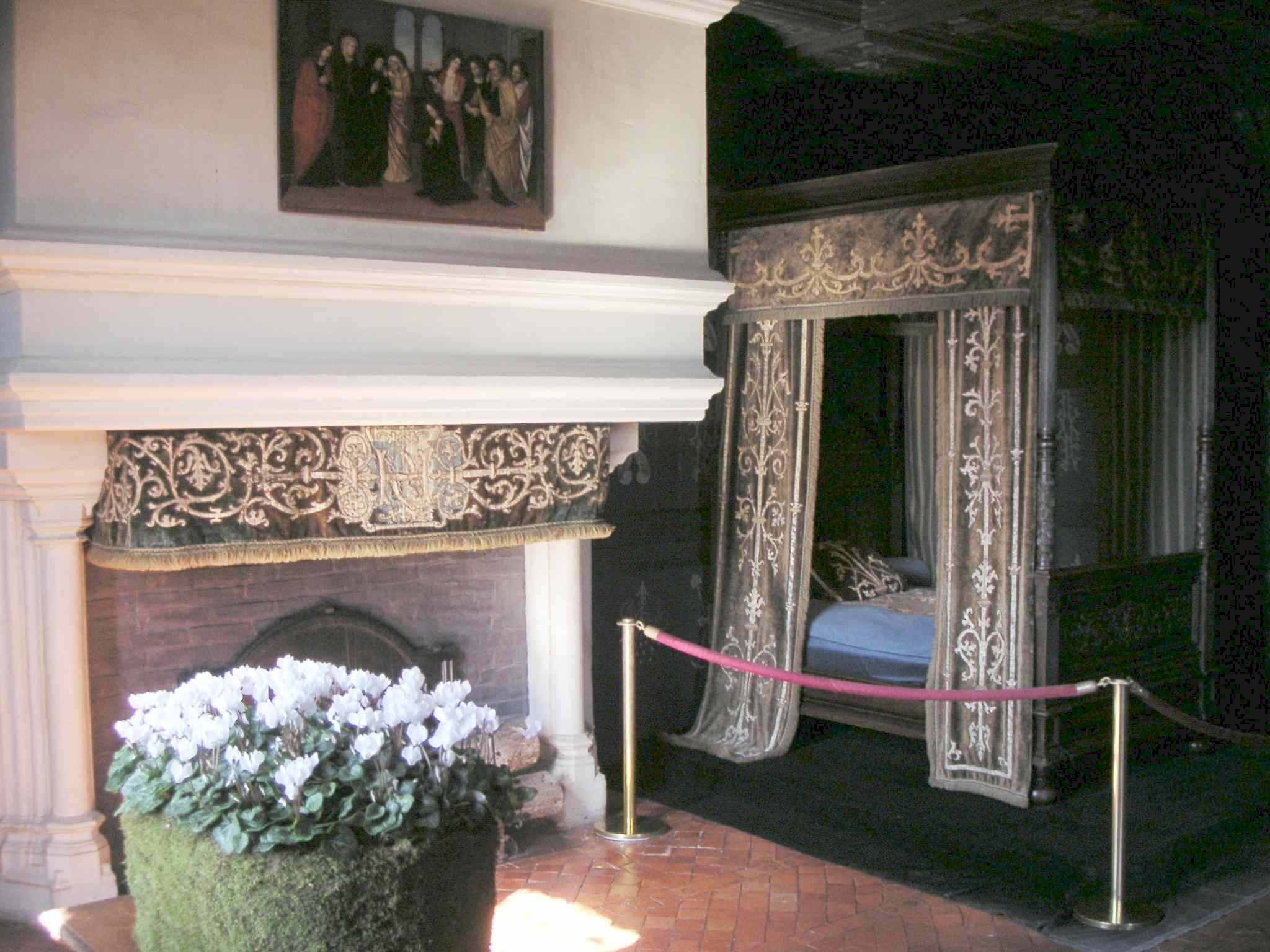 Lit à colonnes, chambre de Louise de Lorraine du château de Chenonceau (France)